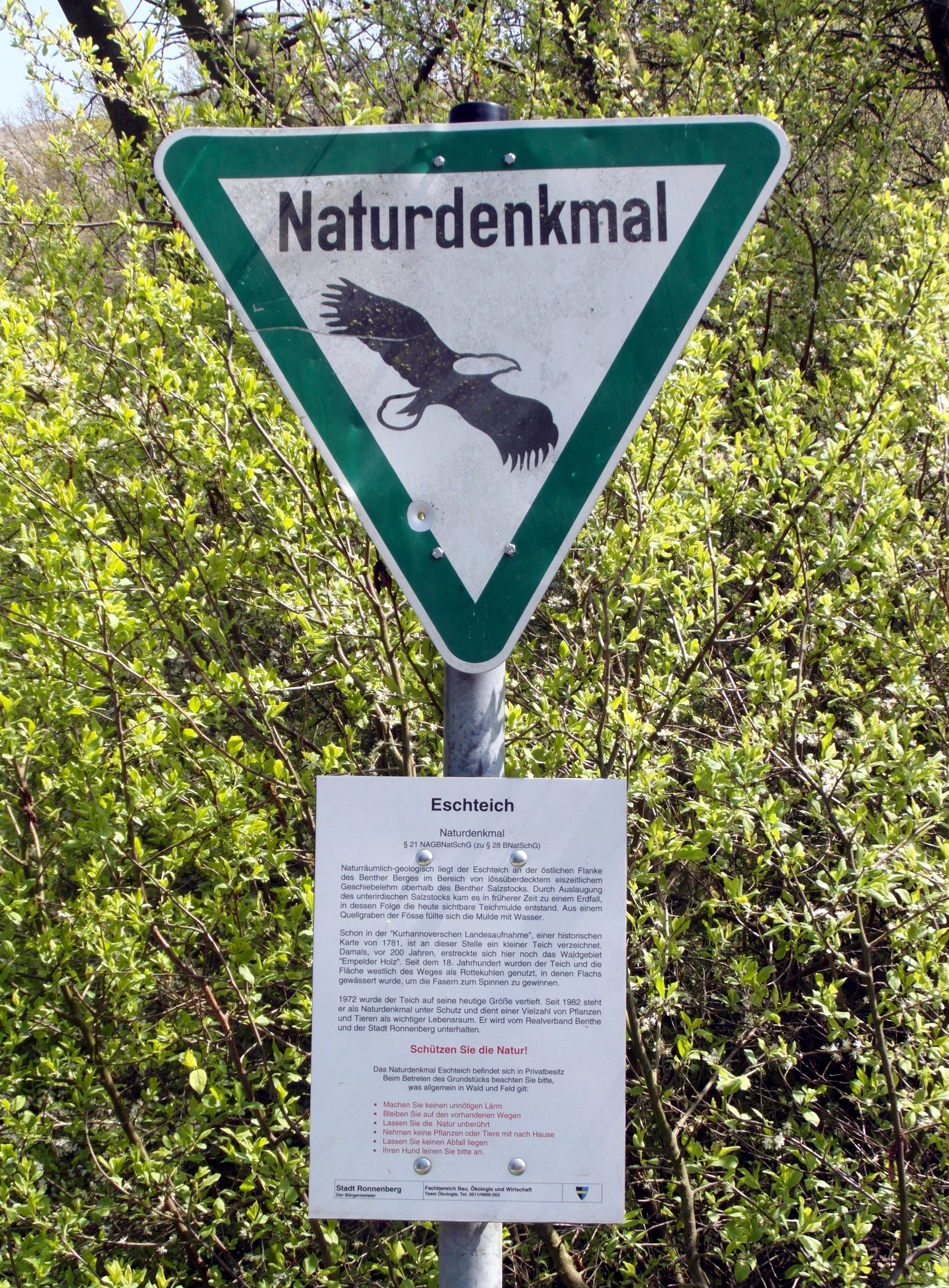 Der Eschteich (ND-H 130) liegt in der Region Hannover zwischen den Ronnenberger Stadtteilen Benthe und Empelde bzw. zwischen dem Benther Berg und der Abraumhalde nahe der Bundesstraße B65. Die Informationstafel unter dem leicht vandalierten Hinweisschild nennt einige Details zum Naturdenkmal.